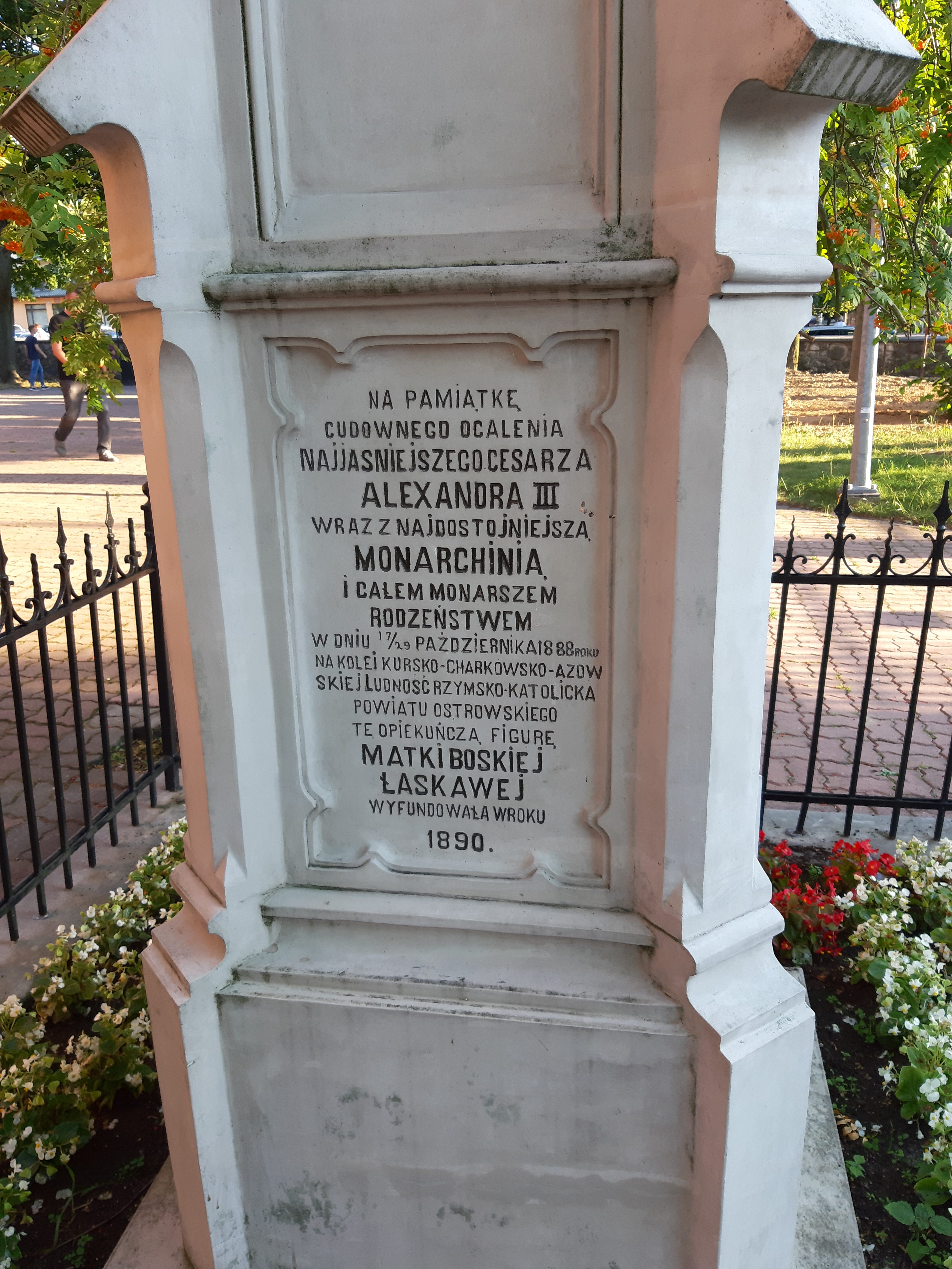 Inskrypcje na cokole pominika przed kościołem Najświętszej Marii Panny w Ostrowi Mazowieckiej